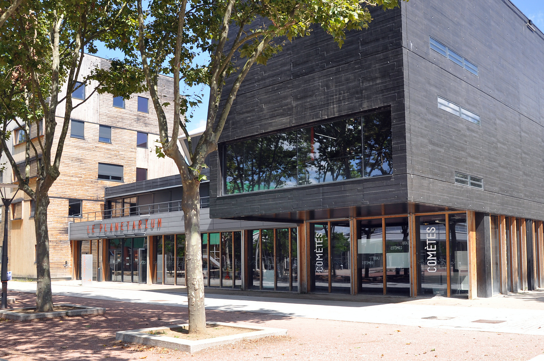 facade du planétarium de Vaulx-en-Velin (vue coté batiment expos)